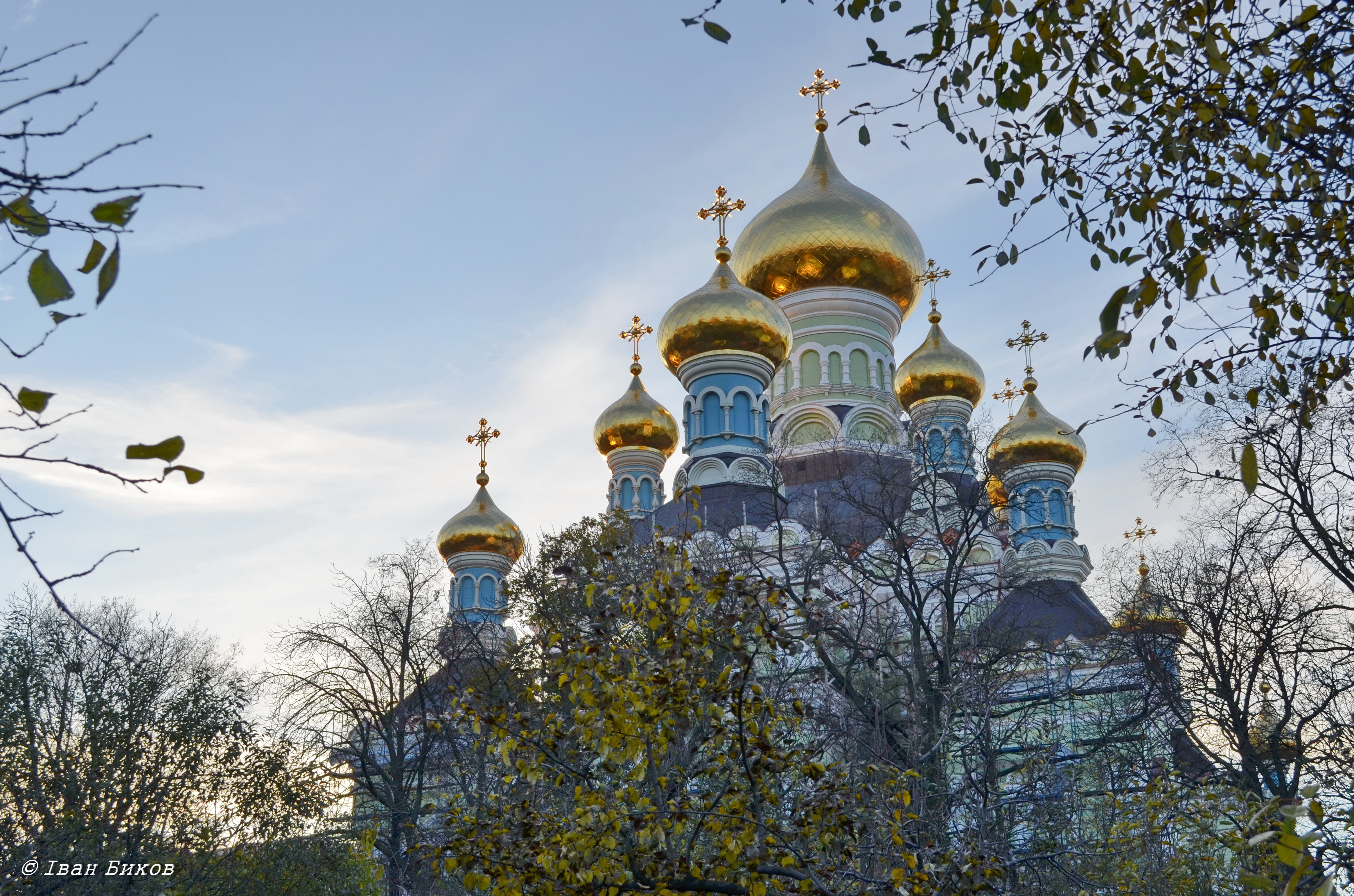 Миколаївський собор Покровського монастиря (Собор Миколаївський), Київ, Бехтеревський пров., 15